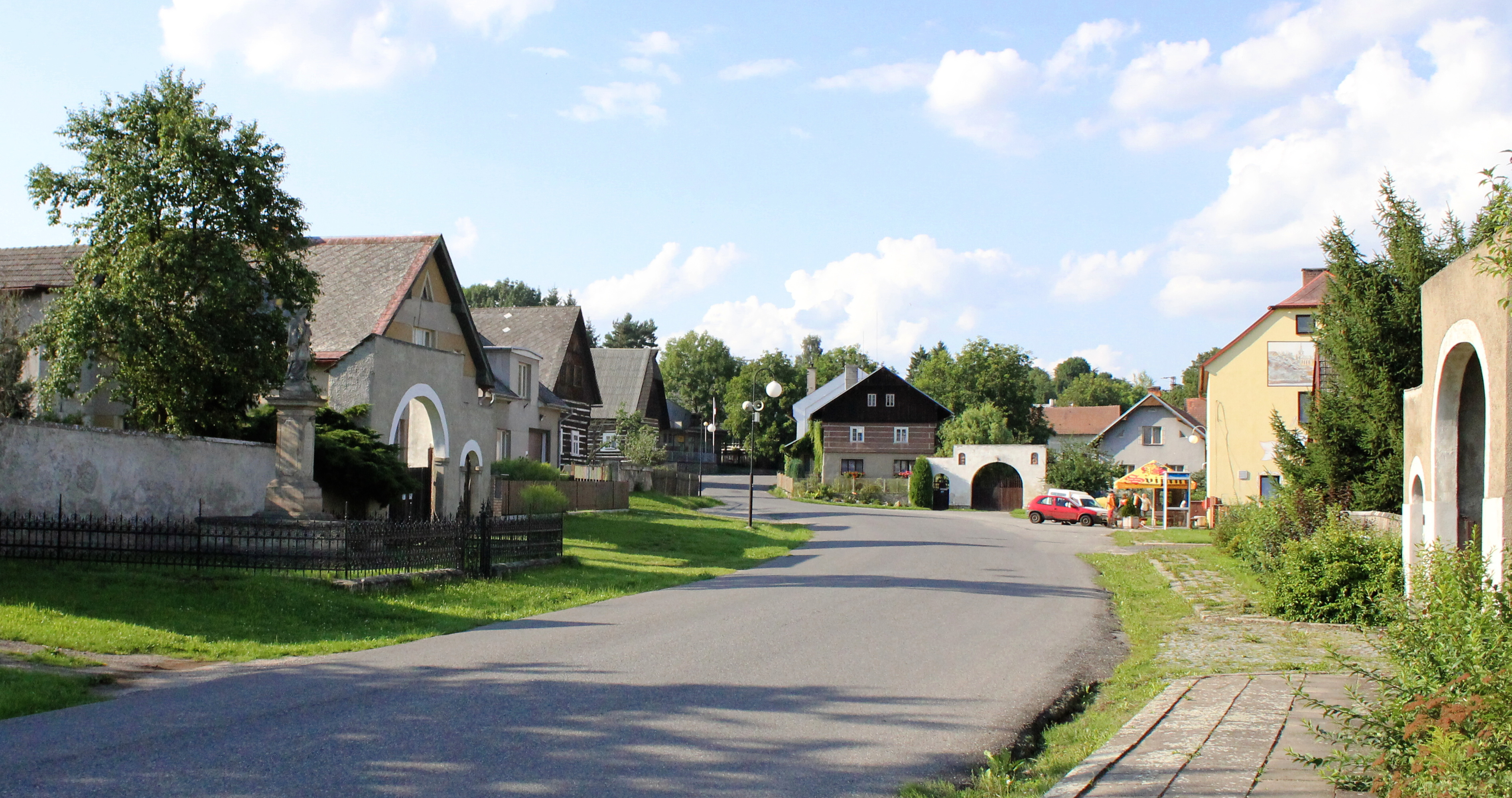 Loukov